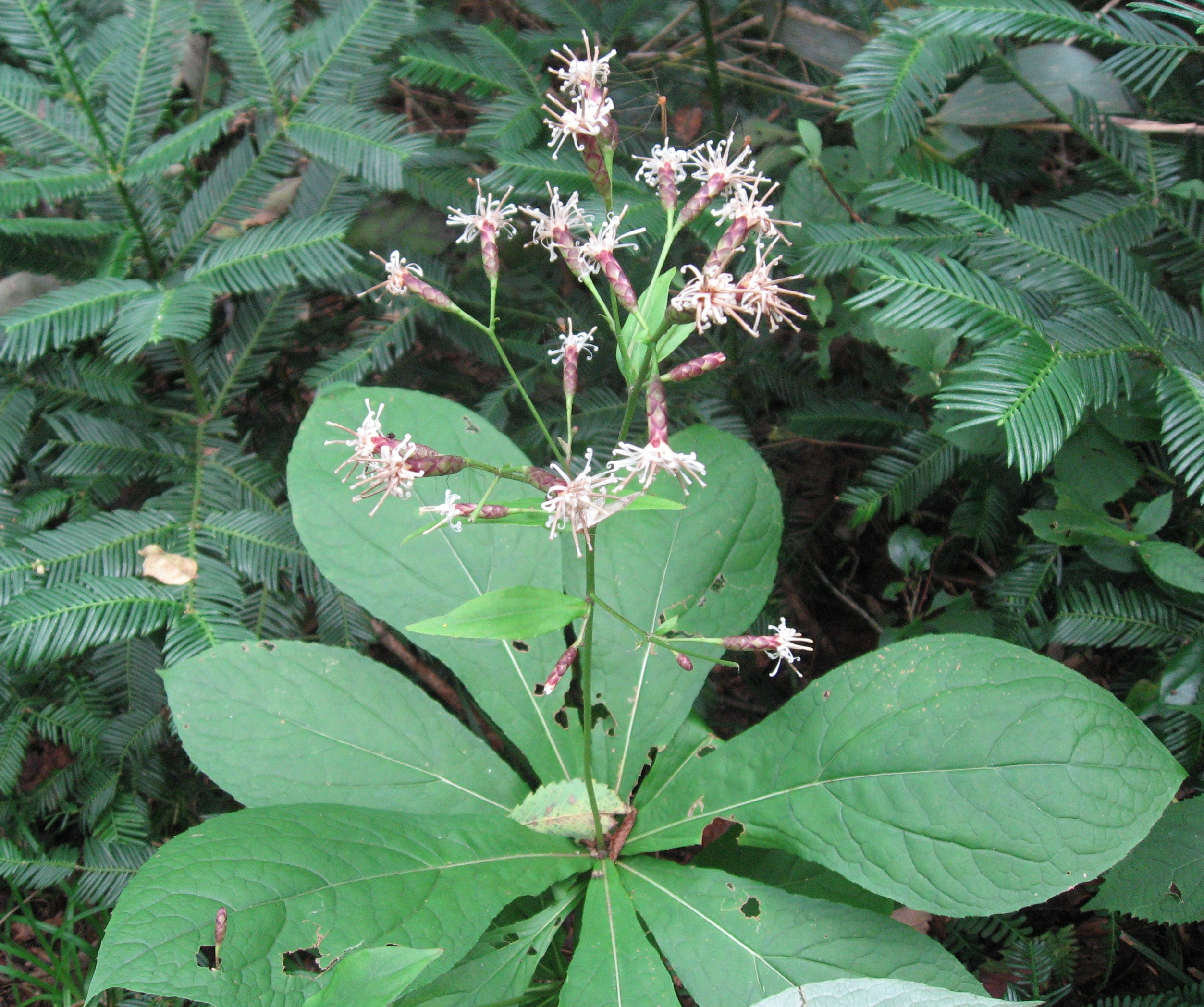 クルマバハグマ Pertya rigidula